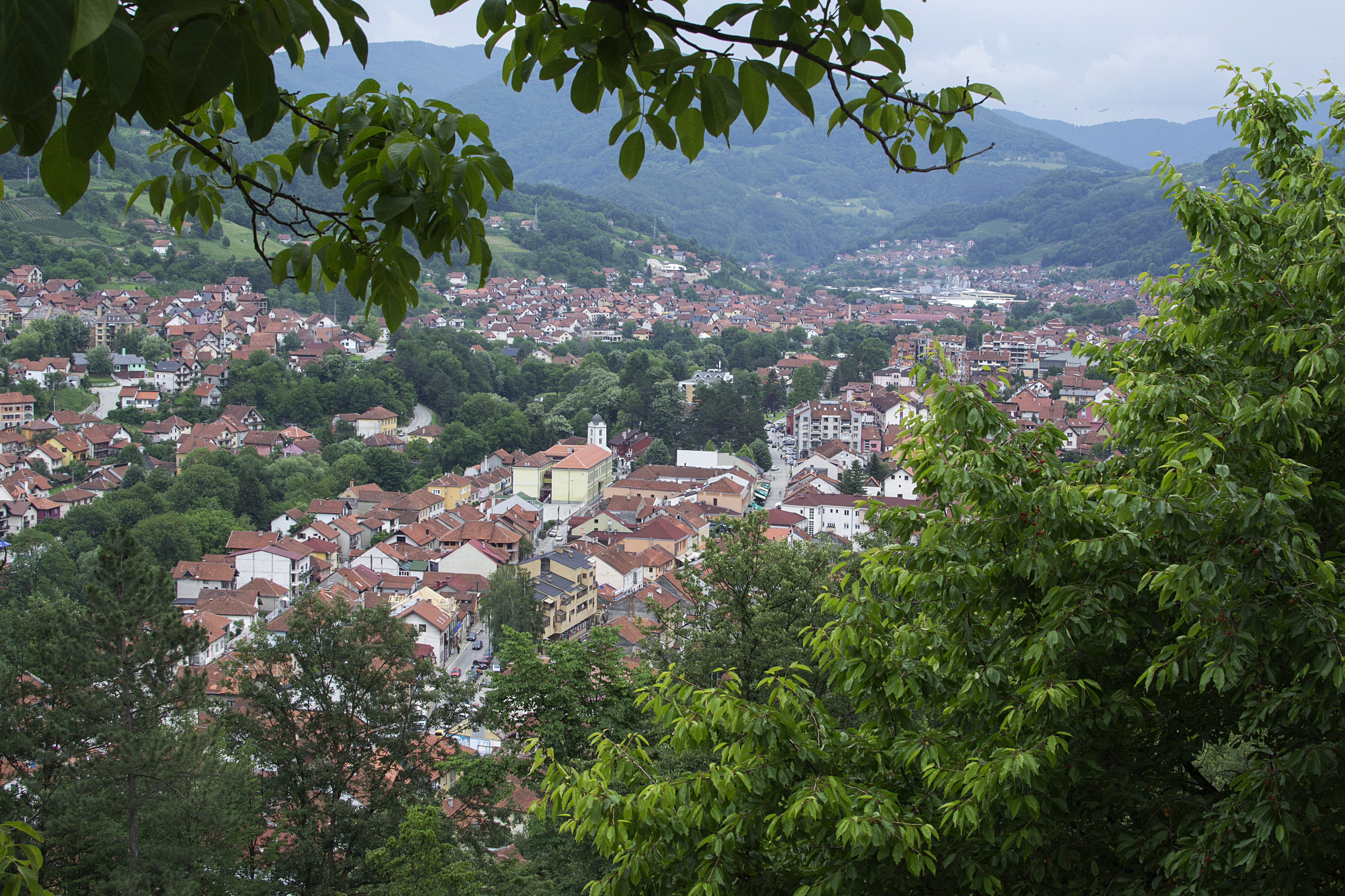 Део градског центра Ивањице